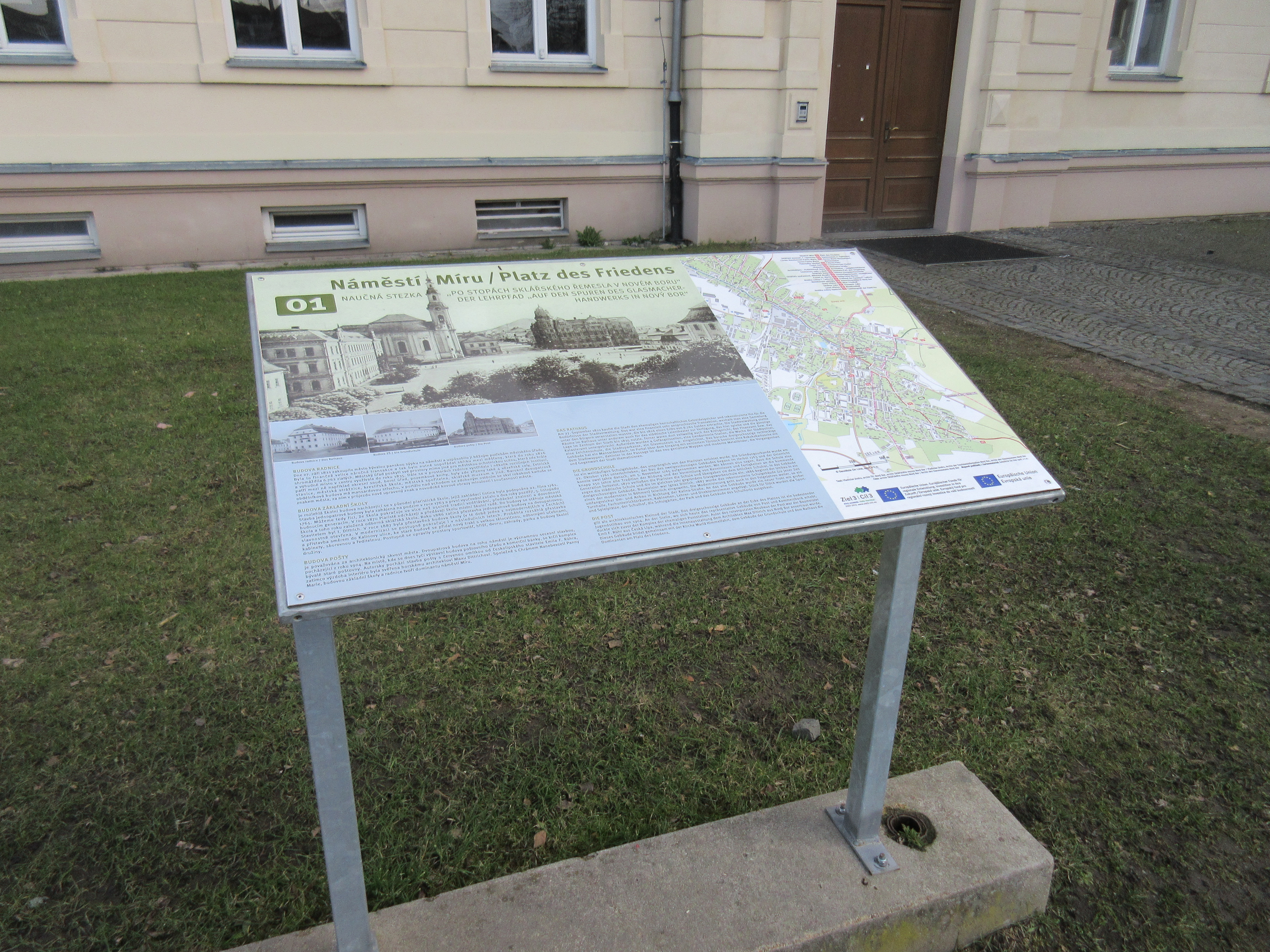 Deska 1 naučné stezky